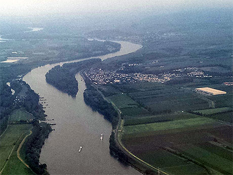 Luftbild von Nackenheim mit Rheininsel Sändchen. Aufnahme von Flug SU2302; 20:14 Uhr.